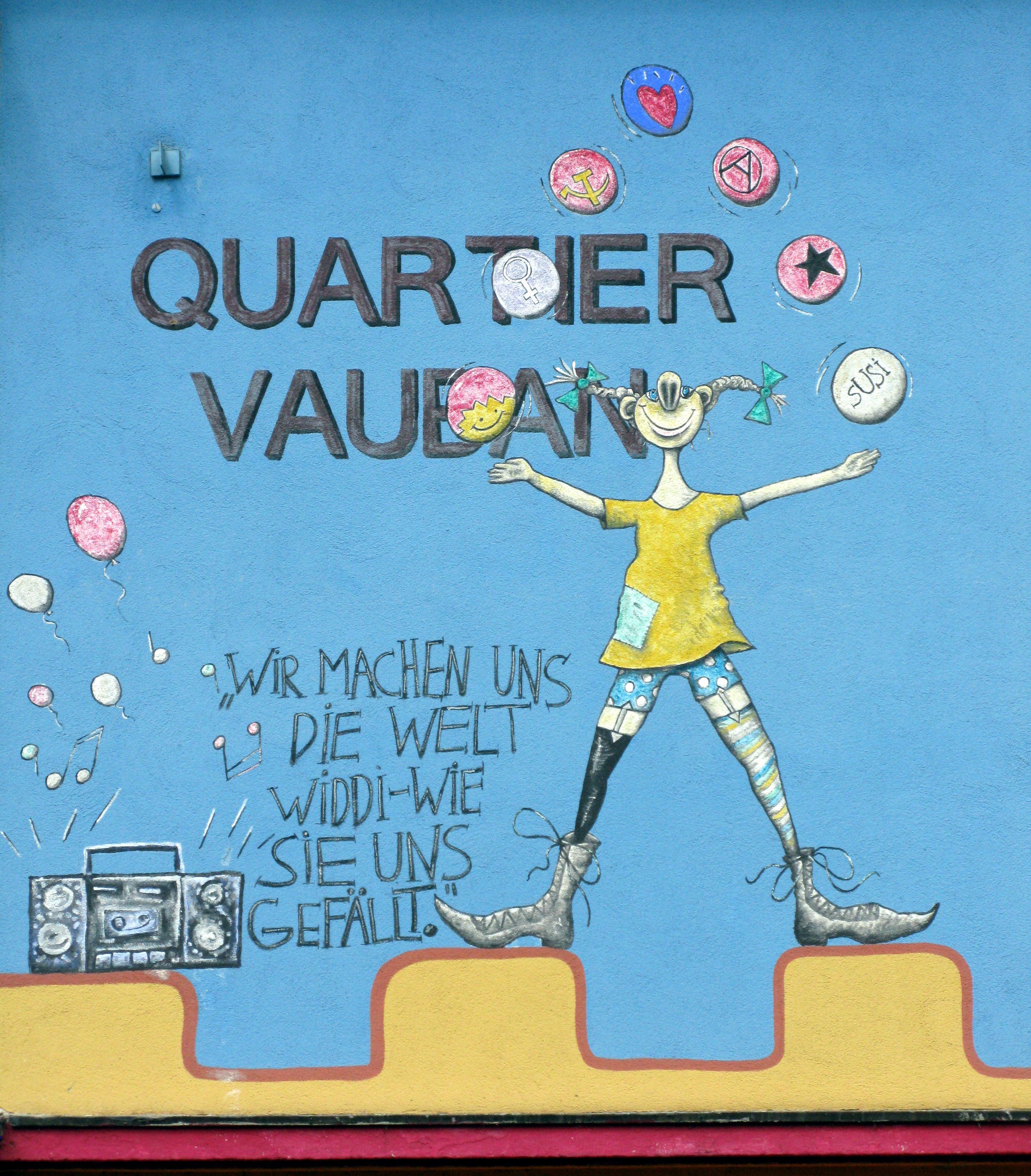 Pippi Langstrumpf mit einer Liedzeile auf einer Fassade in Freiburg-Vauban, der ehemaligen Vauban-Kaserne (französisch: Quartier Vauban)